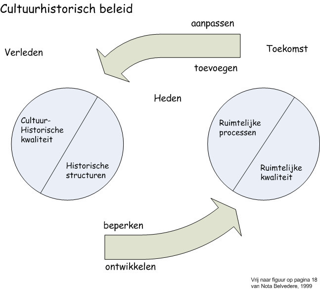 Model relatie cultuurhistorie en ruimtelijke ordening